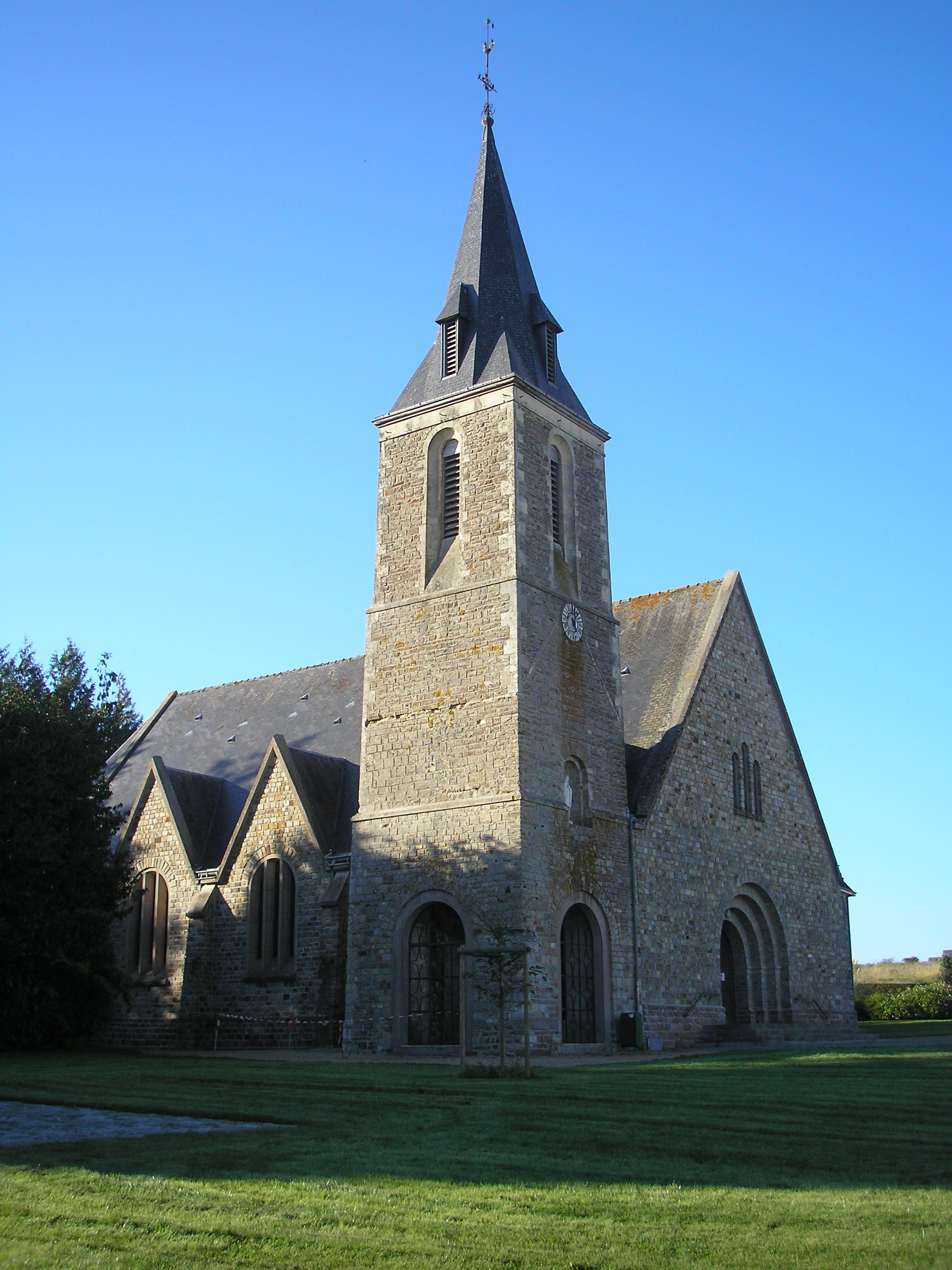 Jurques (Normandie, France). L'église Notre-Dame.